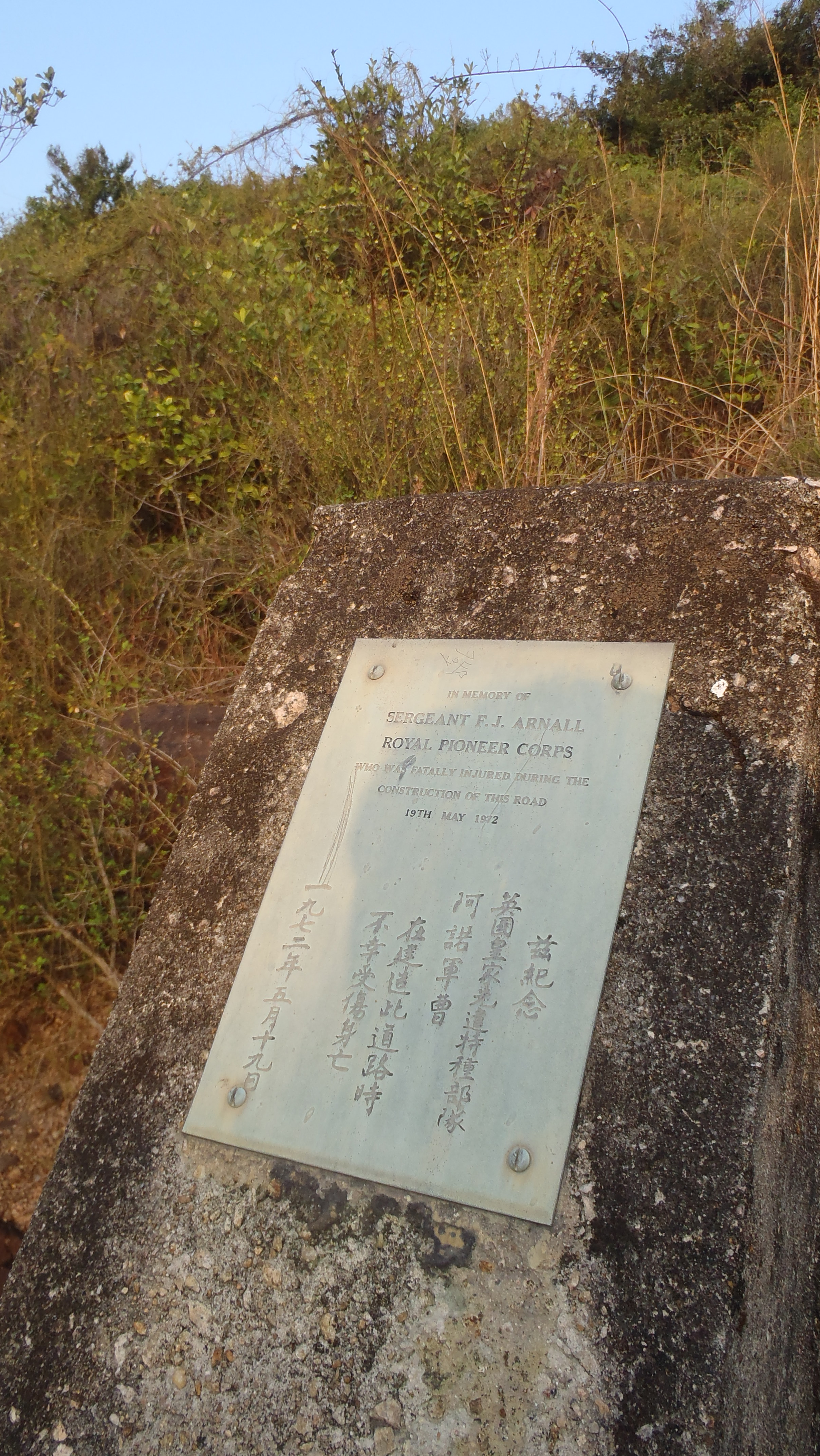 中文（香港）: 阿諾軍曹